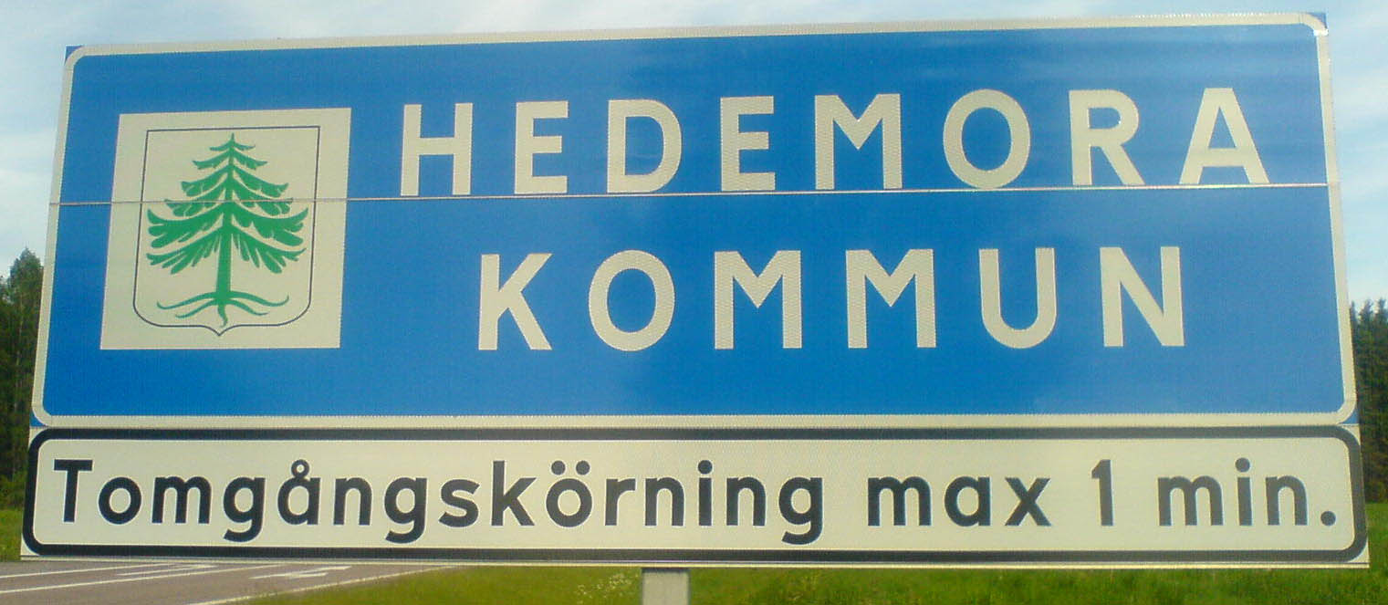 Hedemora kommuns skylt, på gränsen till Säters kommun